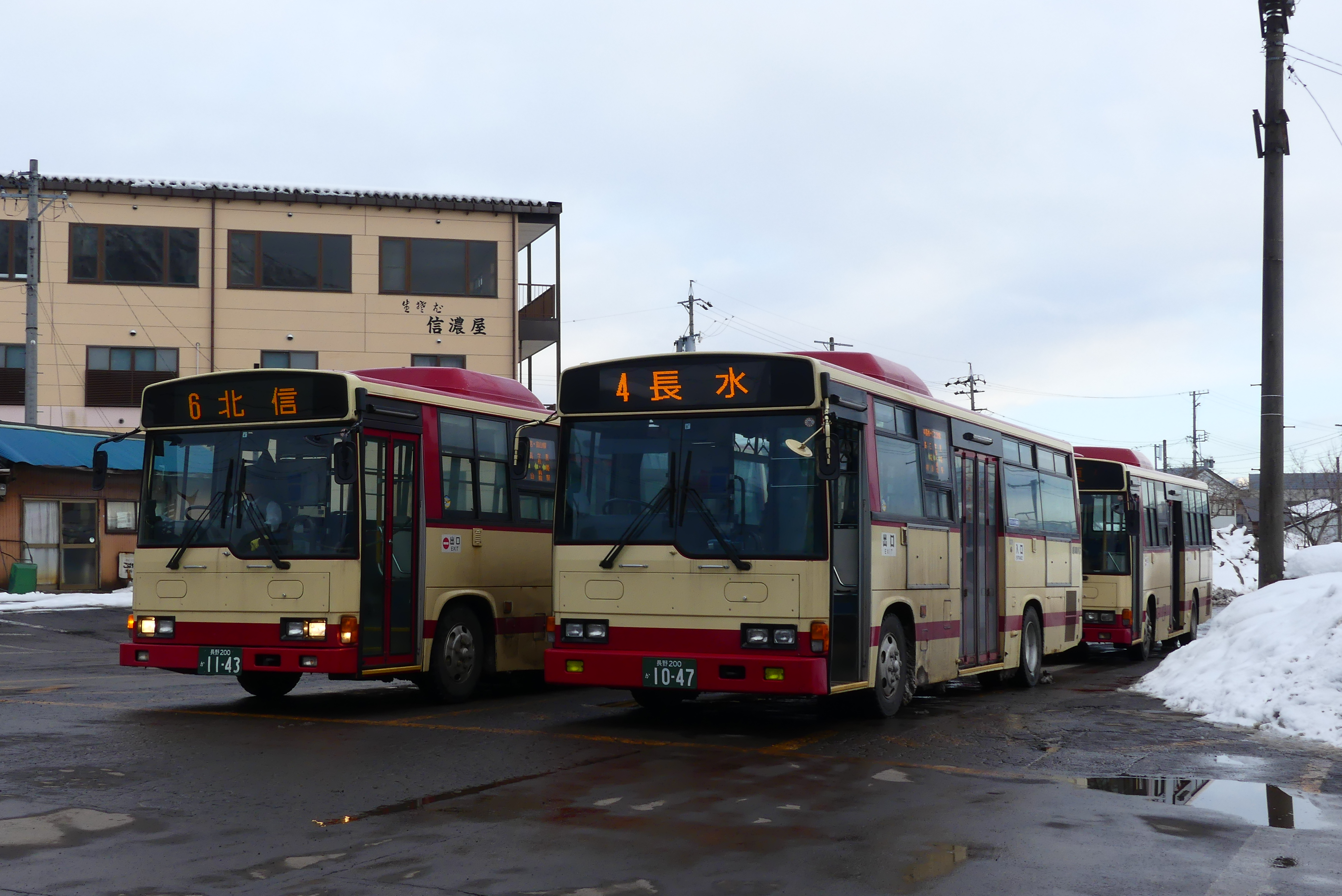 長電バス(路線バス車両)